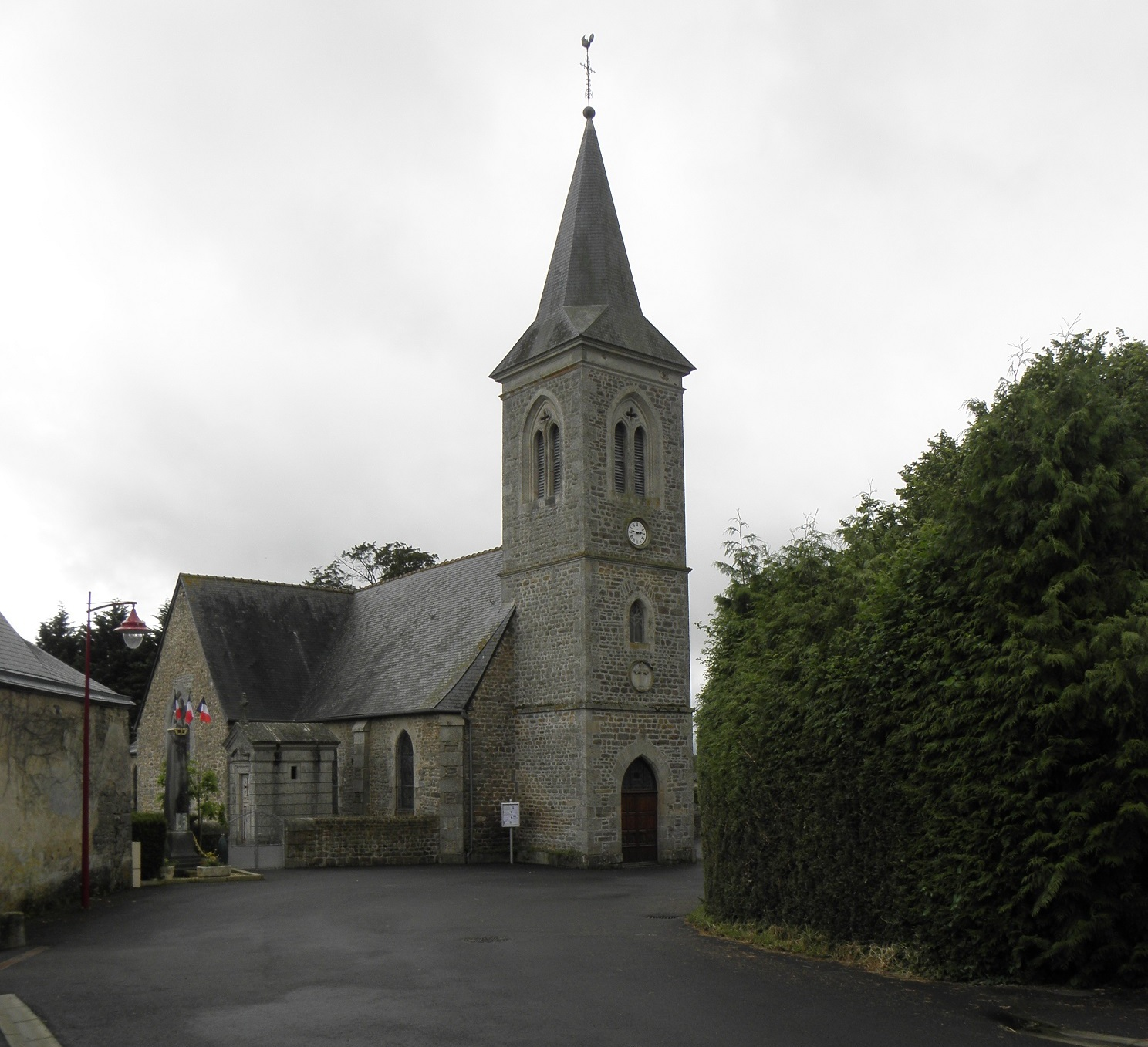 Église Saint-Martin de Lalacelle (61).